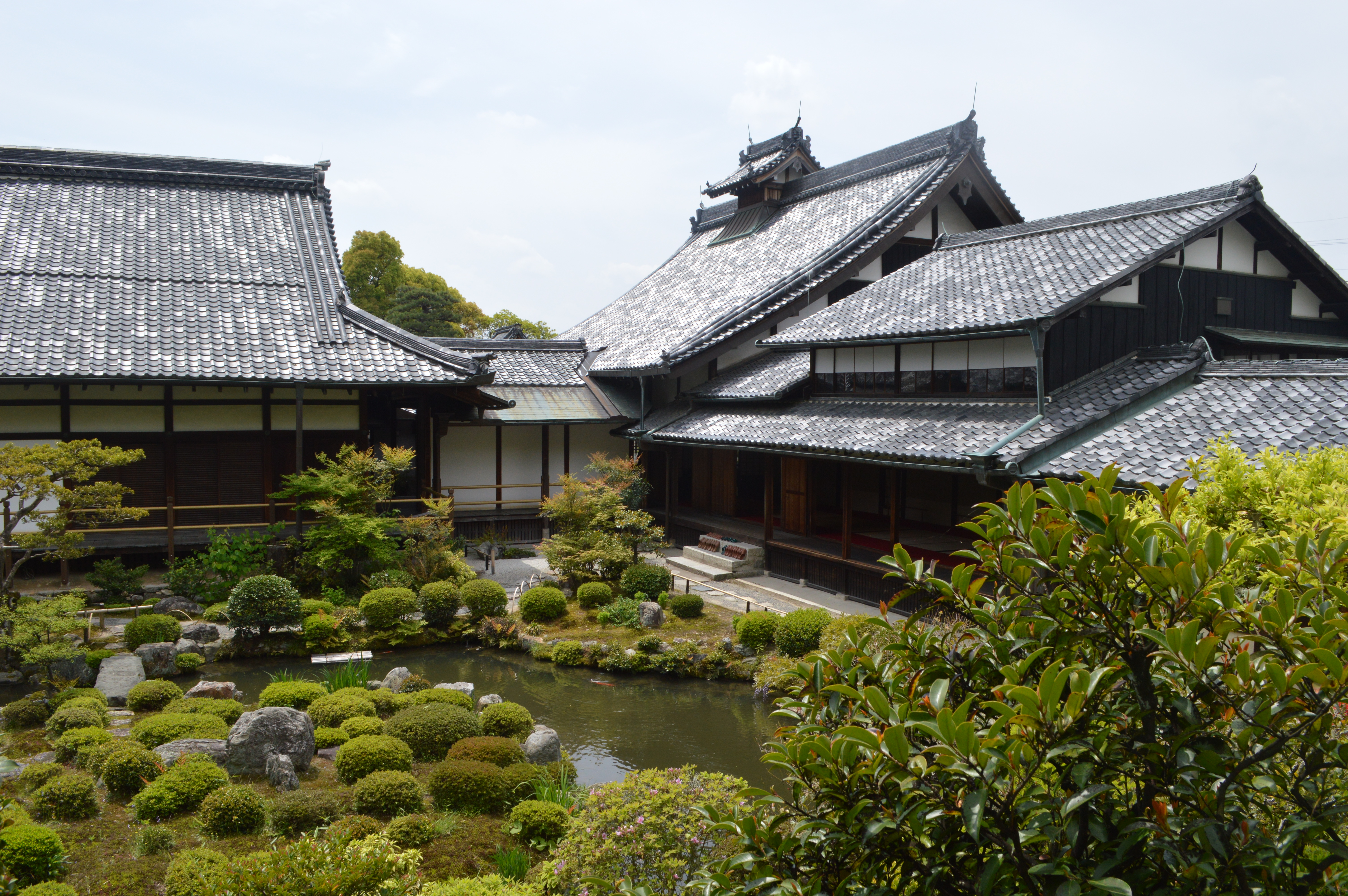 京都市・等持院